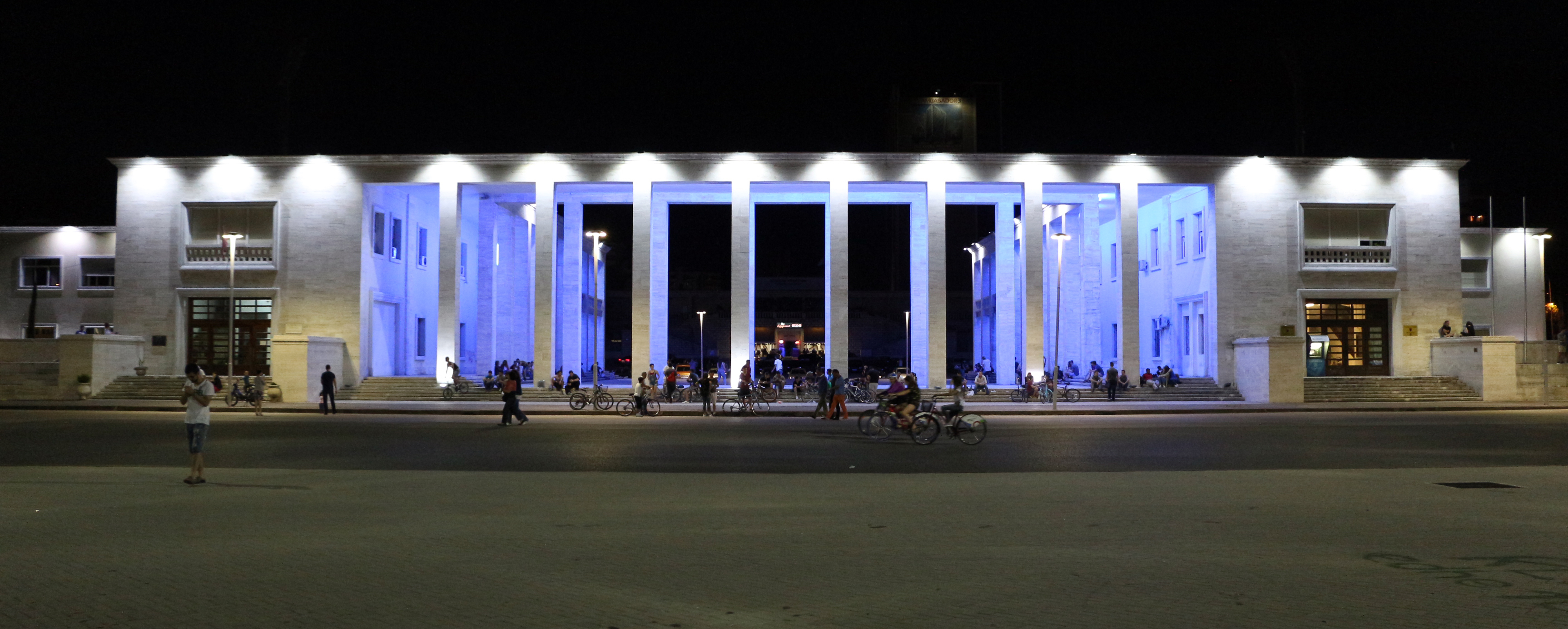 Muzeu Arkeologjik